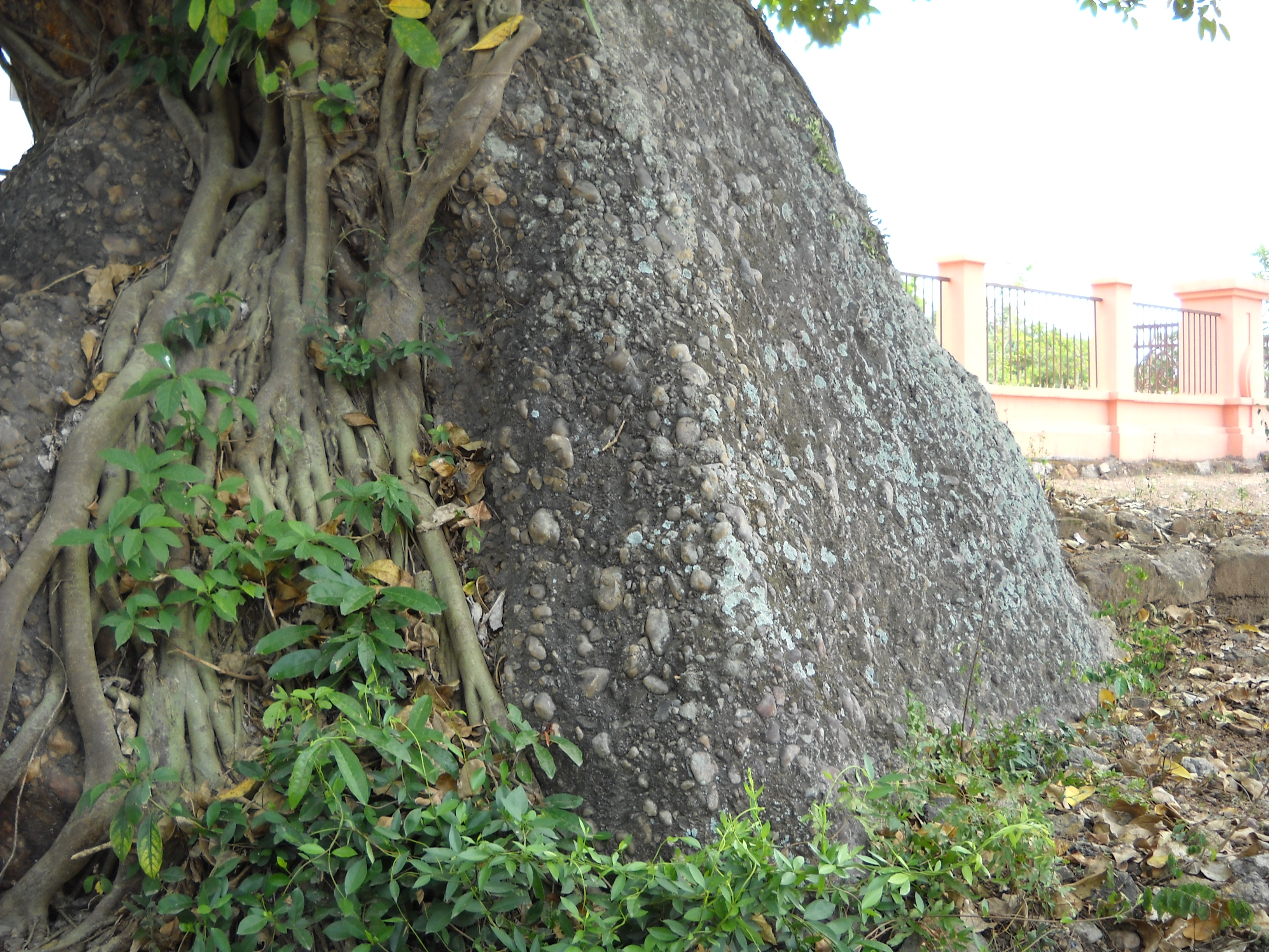 Di tích tường thành Sinhapura (Trà Kiệu)